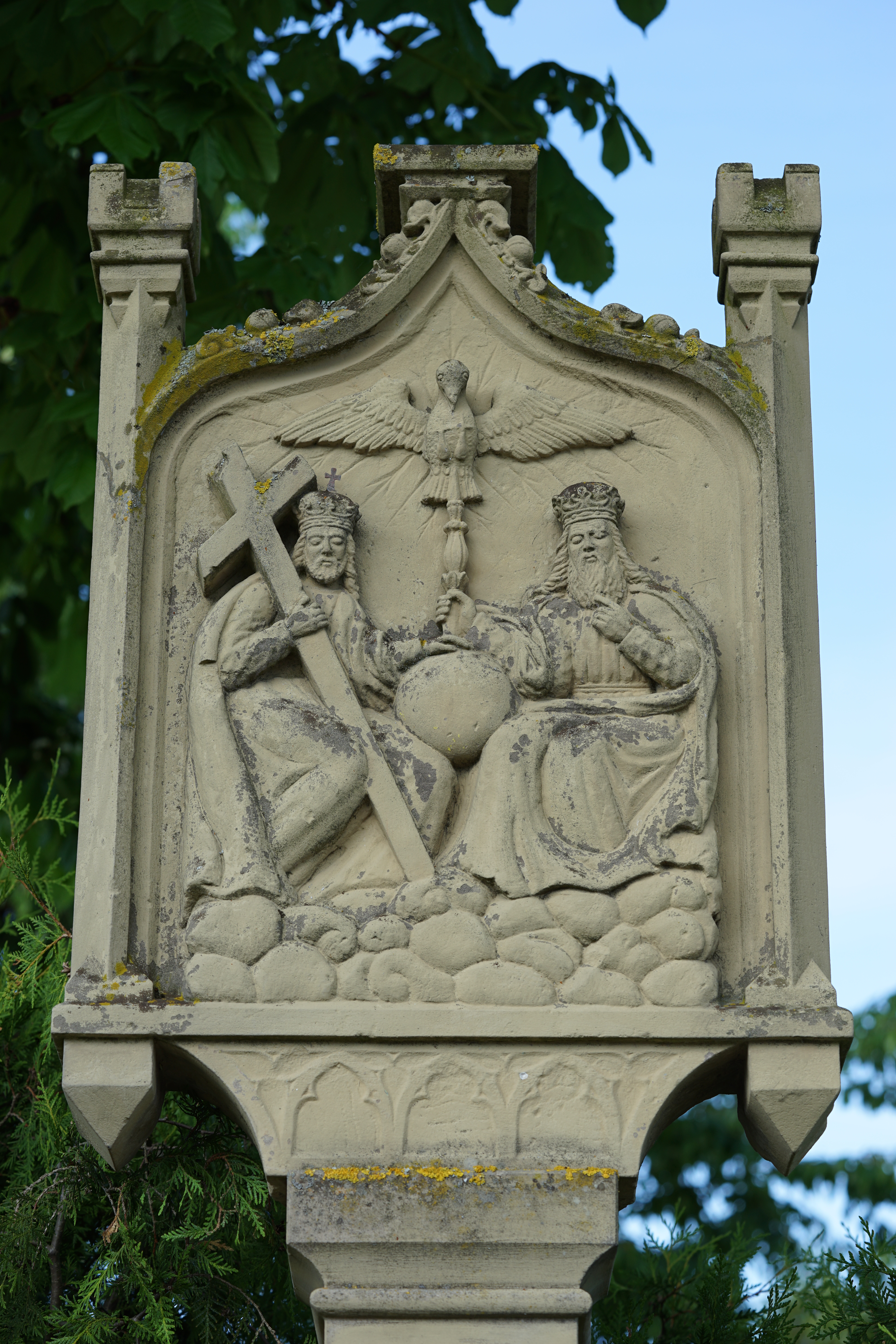 Dörzbach (Hohenlohekreis), Ortsteil Meßbach: historischer Bildstock mit Darstellung der Heiligen Dreifaltigkeit an der Siedlungsstraße.